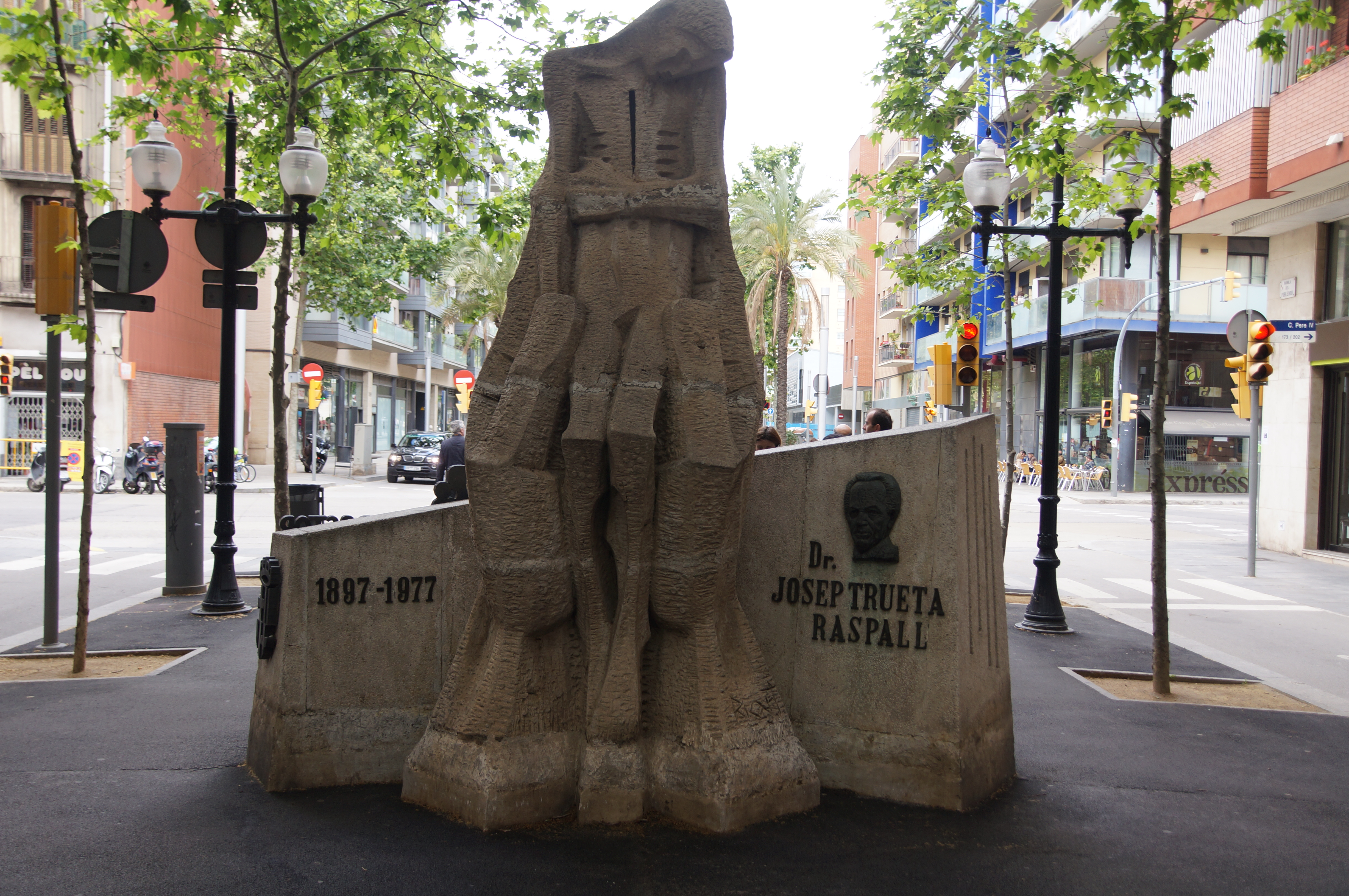 Al doctor Trueta (Josep Ricart i Maymir). Rambla del Poblenou amb Pere IV (Barcelona)